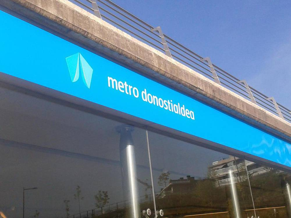 Lugaritz geltokian, Metro Donostialdea izendapena, 2012an ezarria. 2018an oraindik bertan.